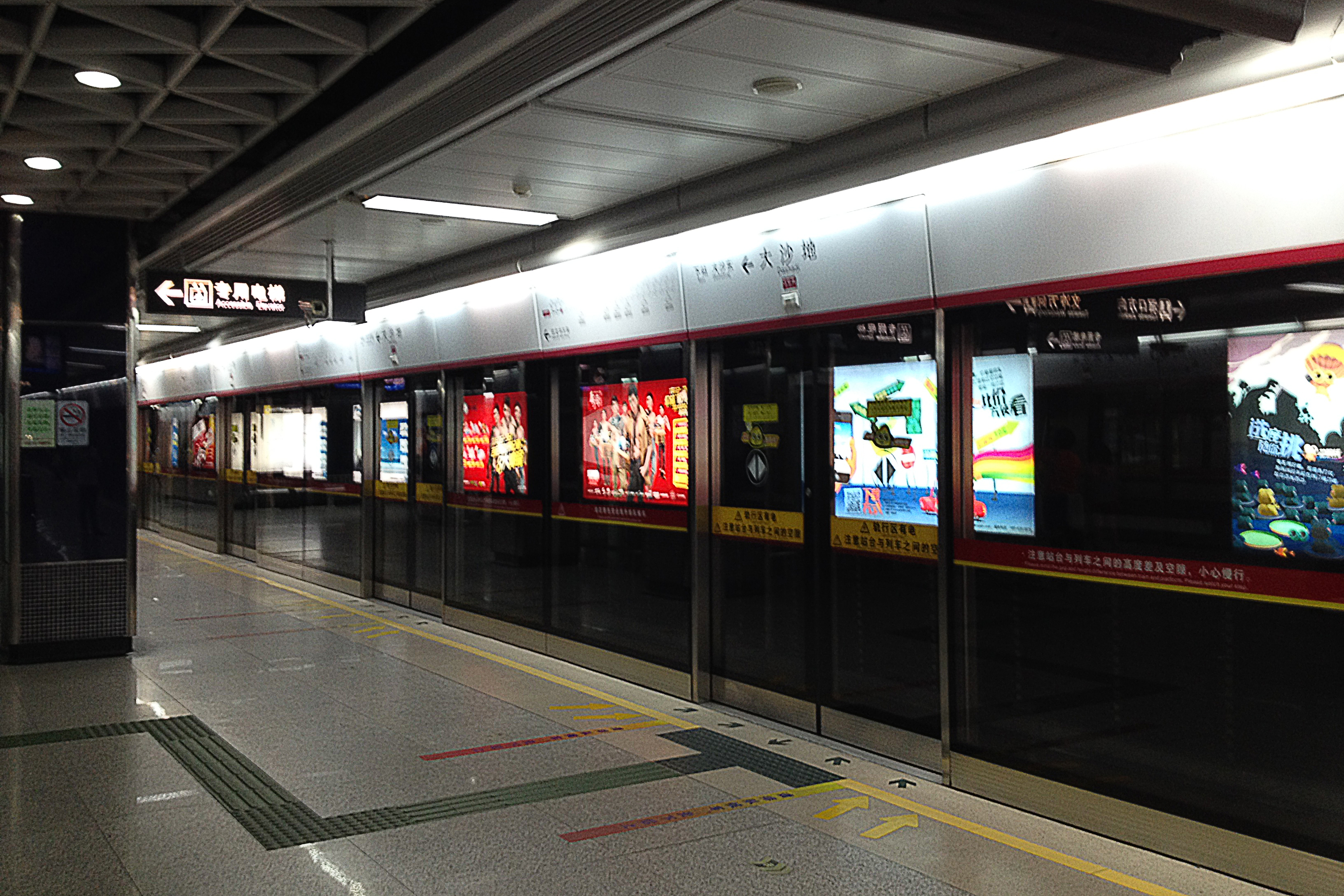 广州地铁大沙地站月台（文冲方向）